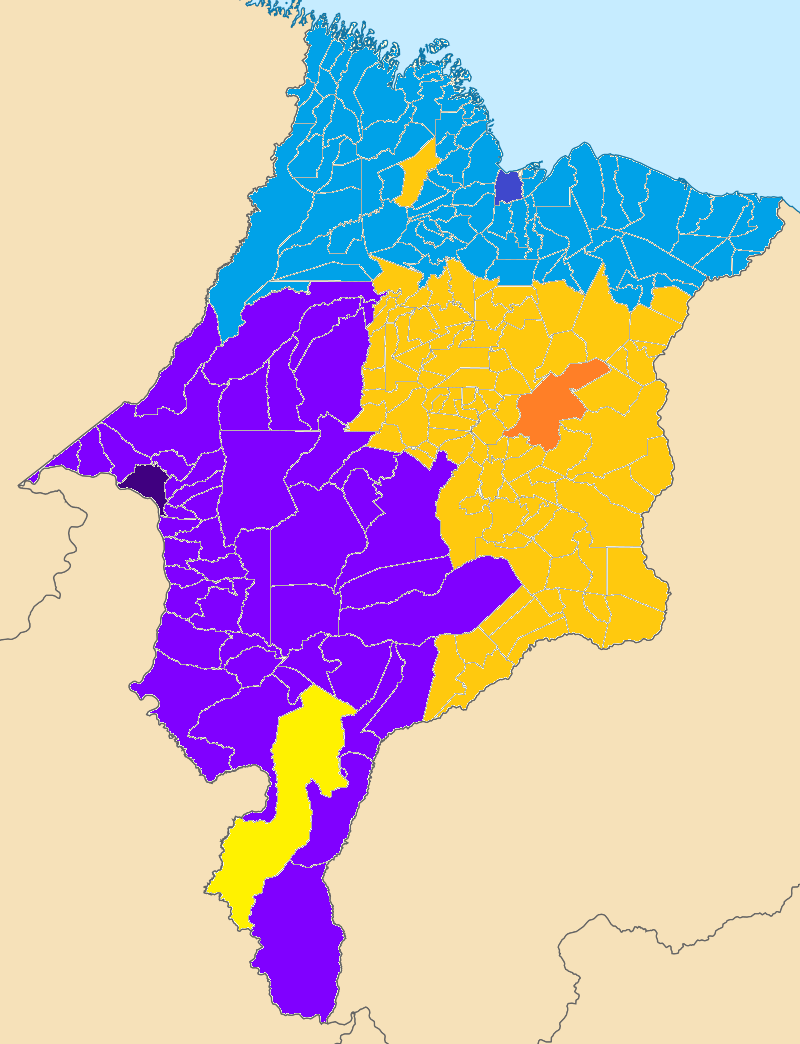 Cobertura das emissoras da Rede Mirante, rede de televisão afiliada à Rede Globo no Maranhão.